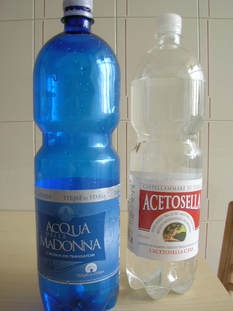 Acqua della Madonna e Acqua Acetosella